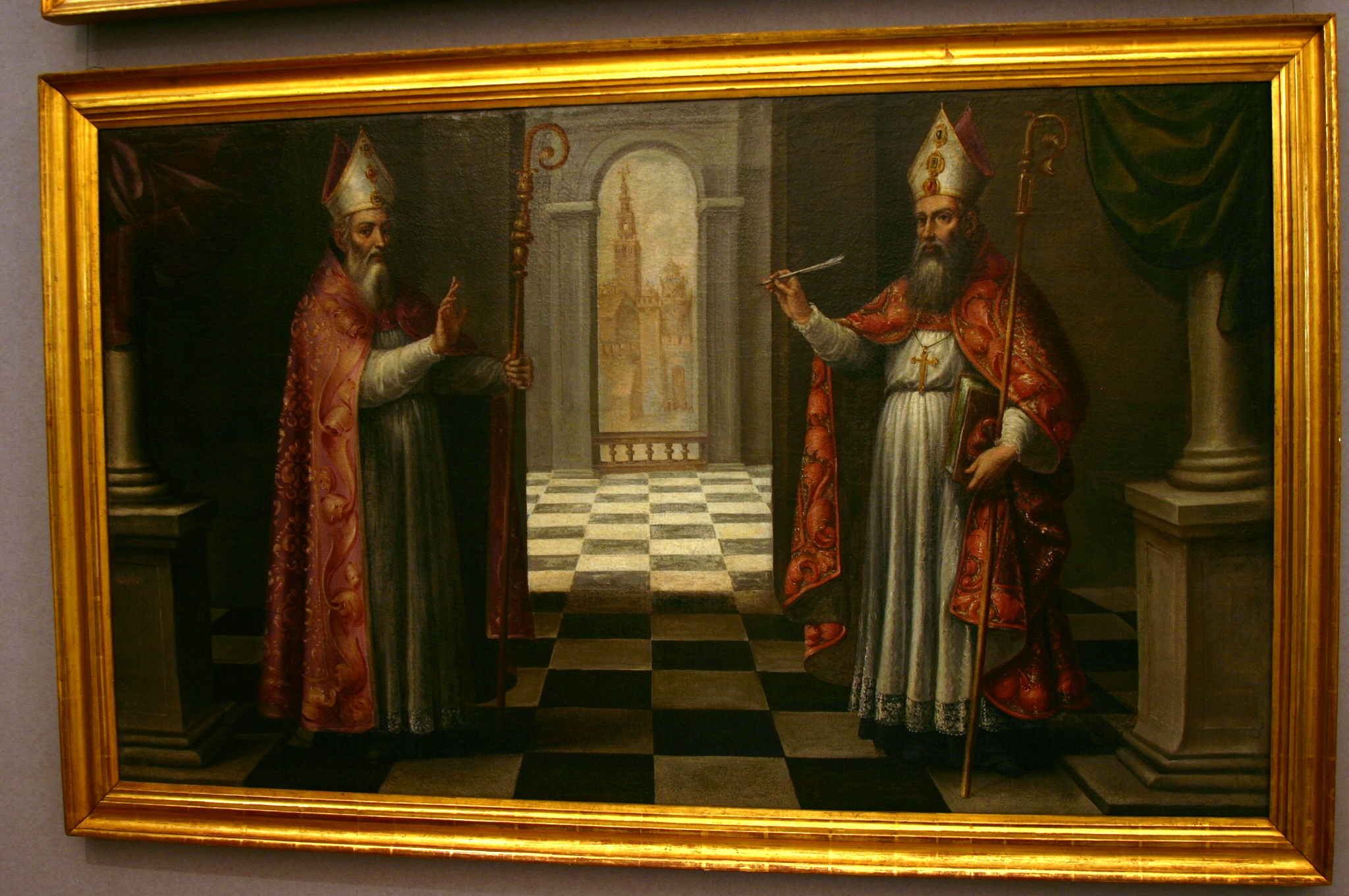 Santos Leandro e Isidoro